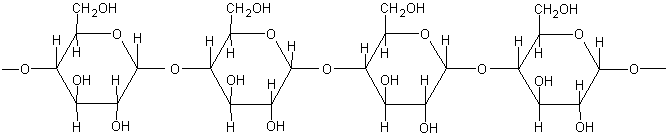 Porzione di una catena ramificata di glicogeno. Tutti i legami della porzione di catena non ramificata sono α1→4